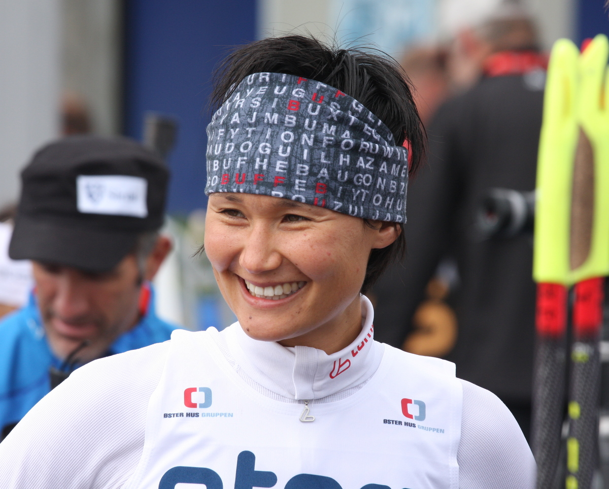 Simone Hauswald under Blinkfestivalen i Sandnes 2009